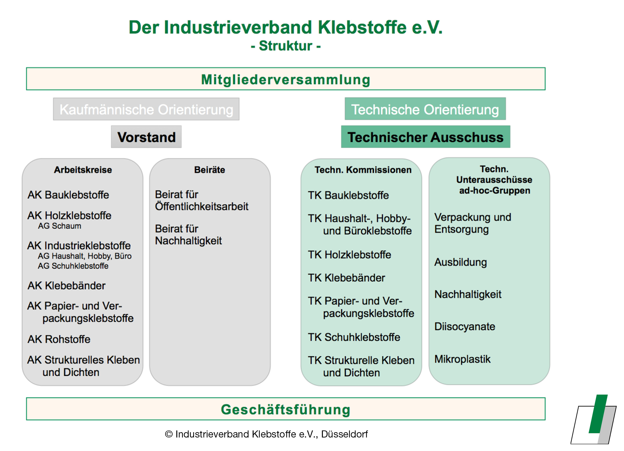 Verbandsstruktur des Industrieverband Klebstoffe e.V.